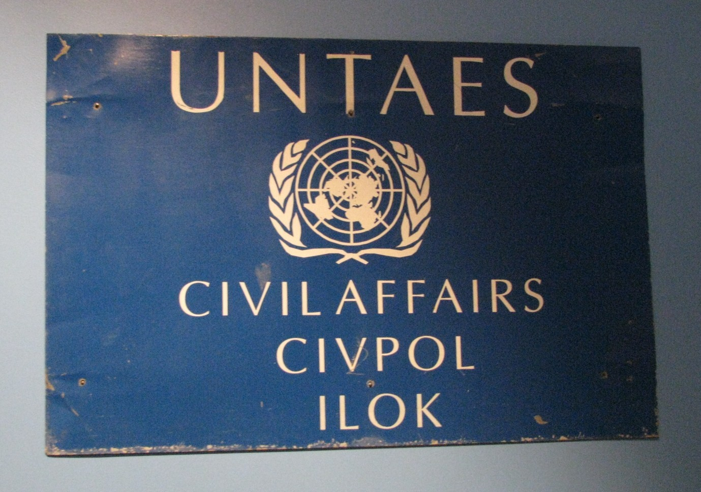 Tabla UNTAES-a, dar predsjedniku Republike uručen 15.1.1998. u Uredu predsjednika RH (izložba Domovinski rat u Hrvatskom povijesnom muzeju)